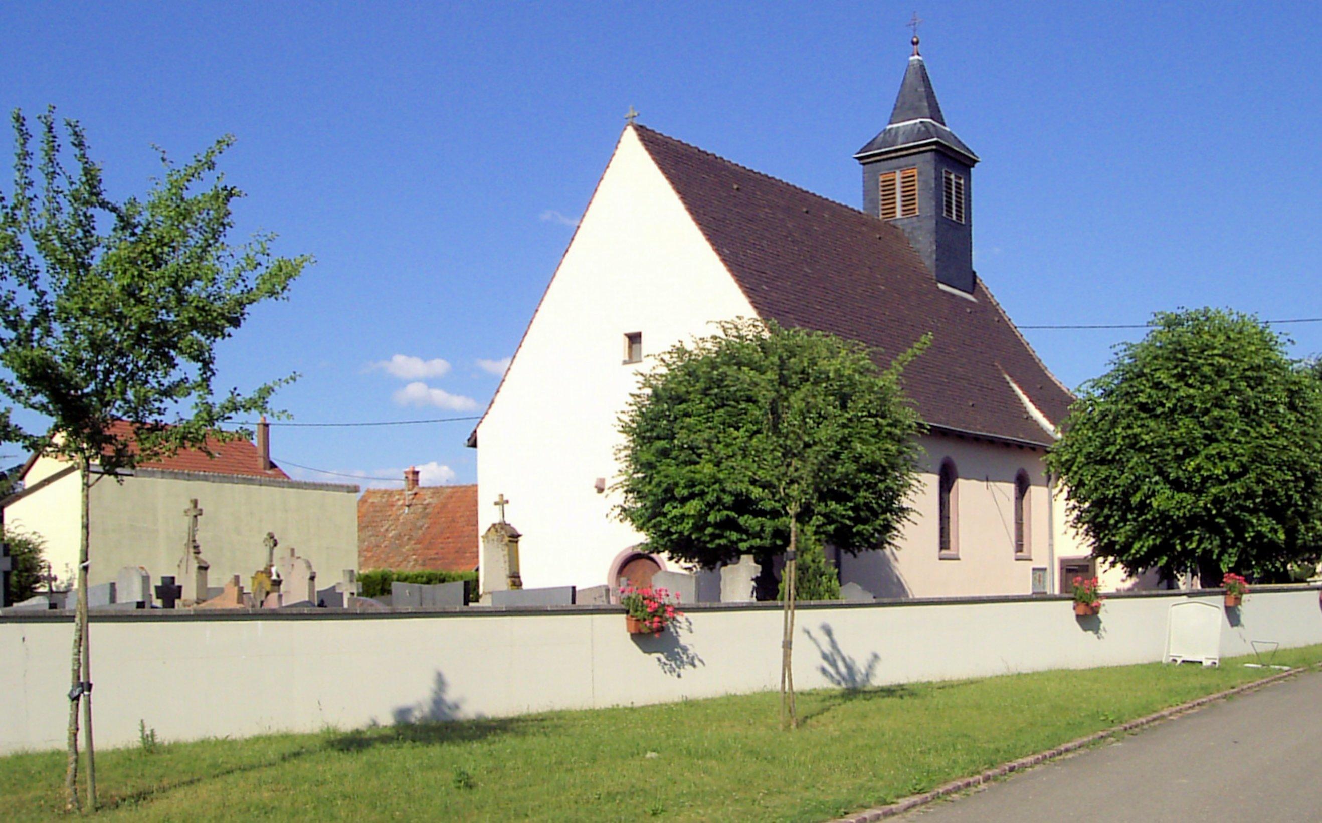 L'église Saint-Wendelin à Roggenhouse